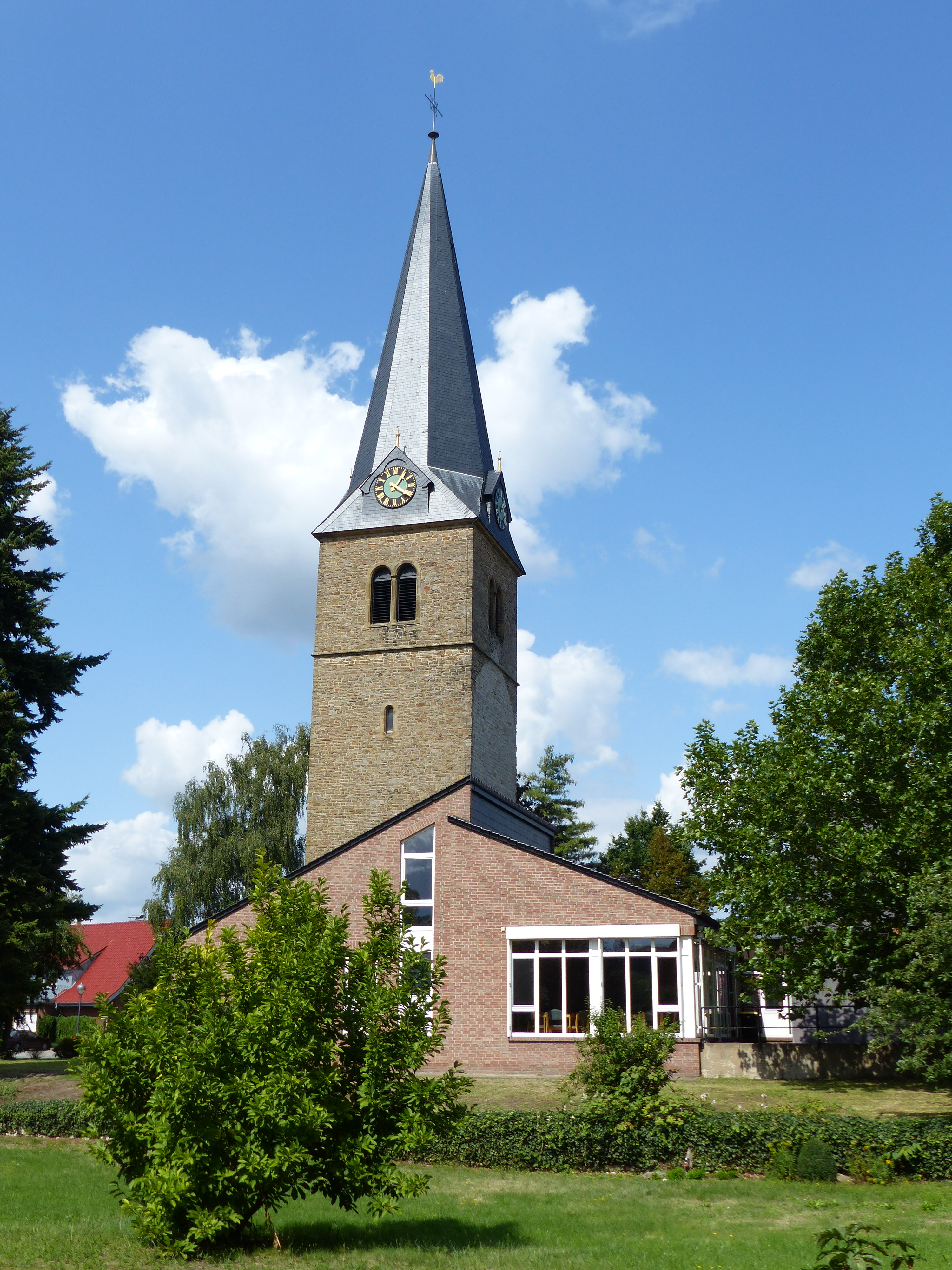 Kirchstraße 64